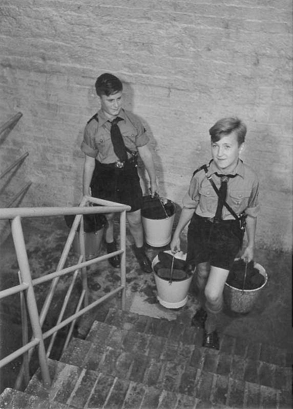 Ein Berliner Mietshaus hat Kriegsdienstpflichten Auch die Jugend hilft in der Nachbarschaftshilfe. Diese Jungens sind die Kohlenträger für die berufstätigen Hausfrauen. Ihre Arbeit wird zur dankbaren Aufgabe, denn sie wissen, das sie durch das Heranschleppen der Kohlen eine berufstätige Kriegerfrau erfreuen.